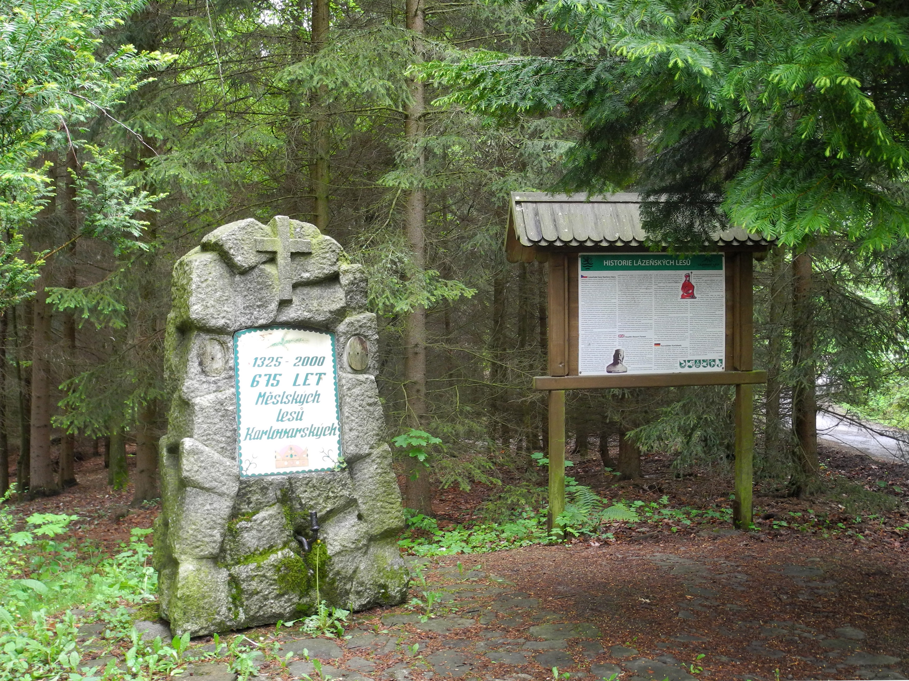 Denkmal 675 Jahre Stadtwald von Karlsbad (1325–2000)